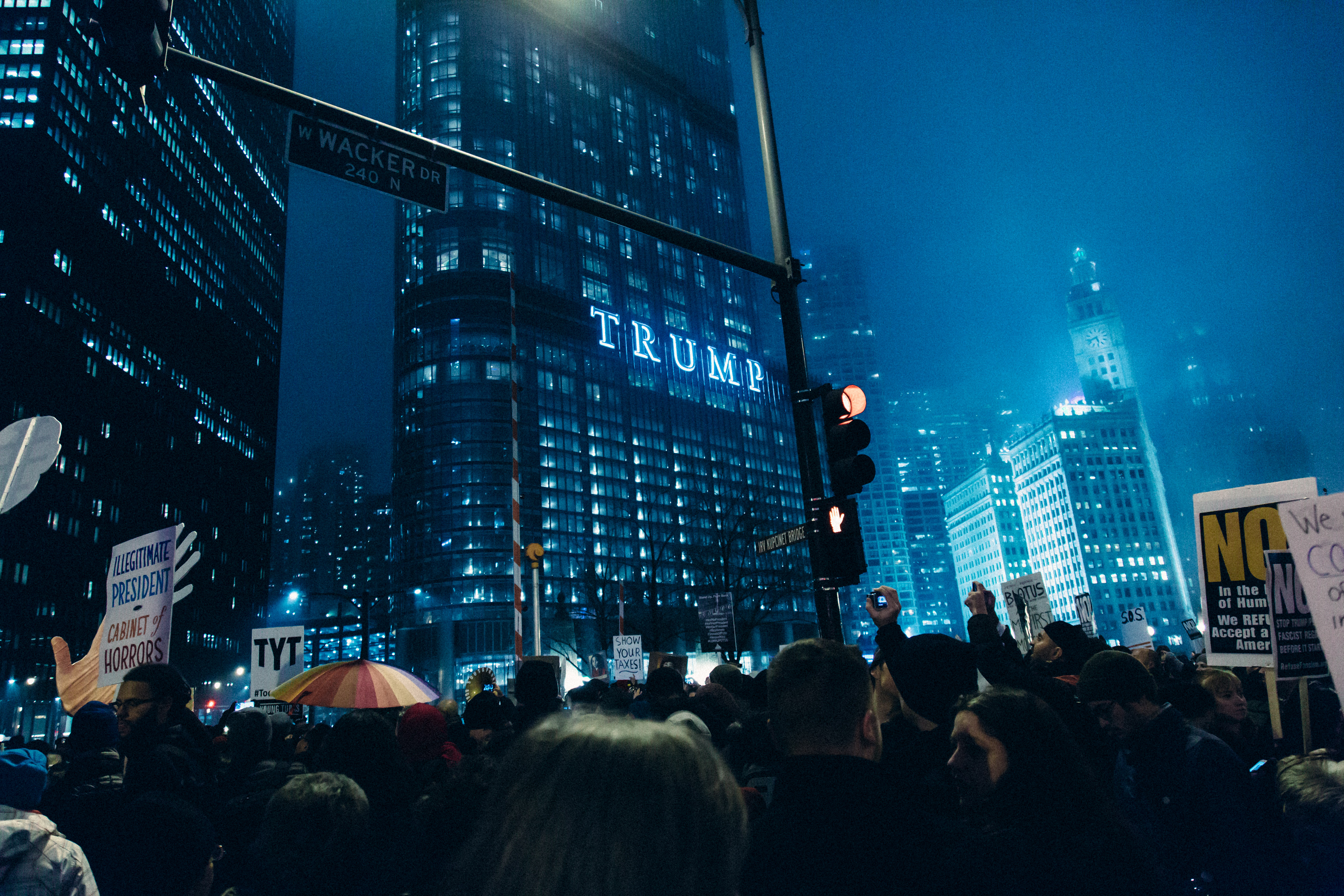 2I4A7398